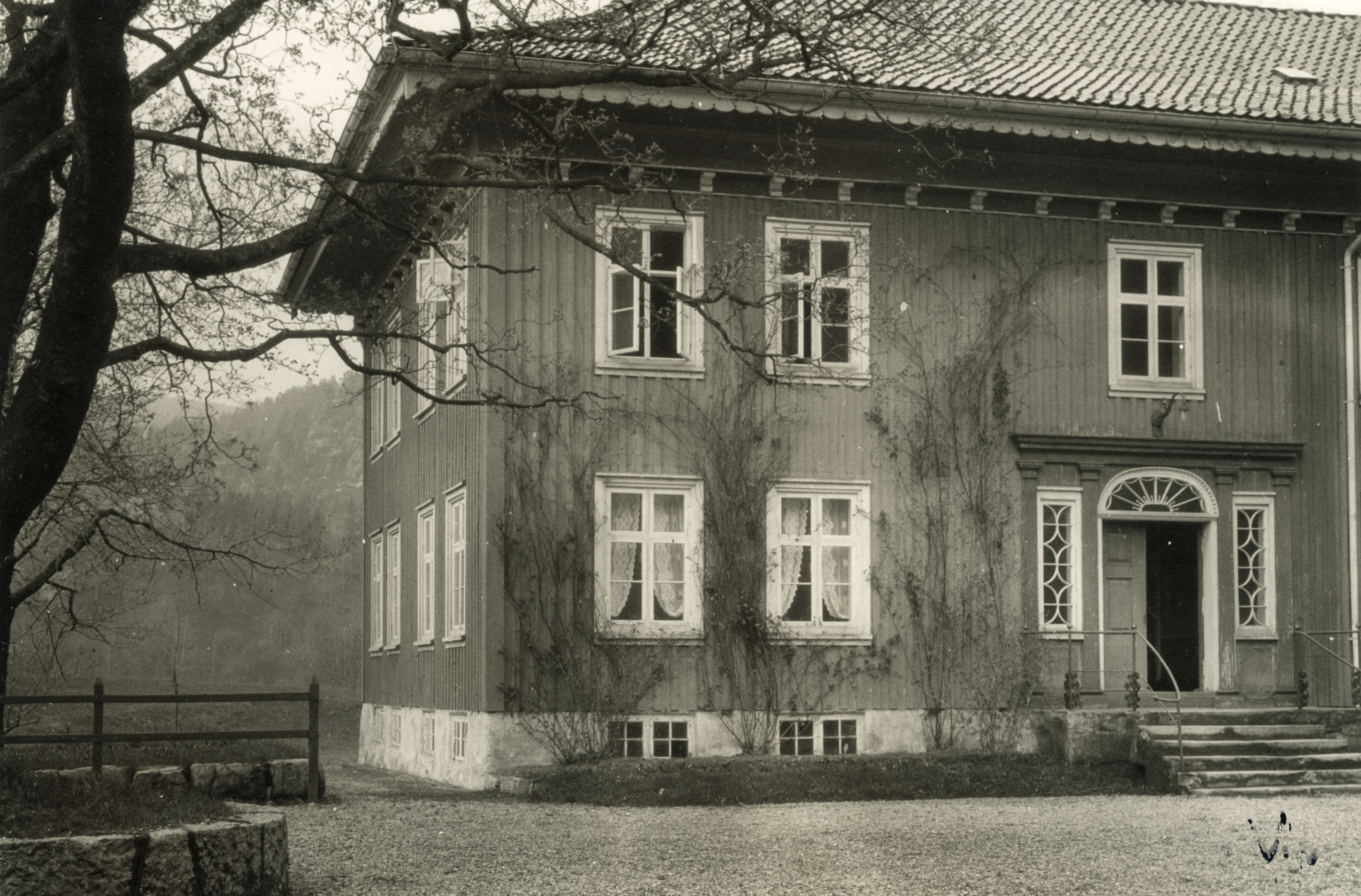 Vigelands verk i Vennesla, Vest Agder Bygningen fra ca. 1830. Gulmalt